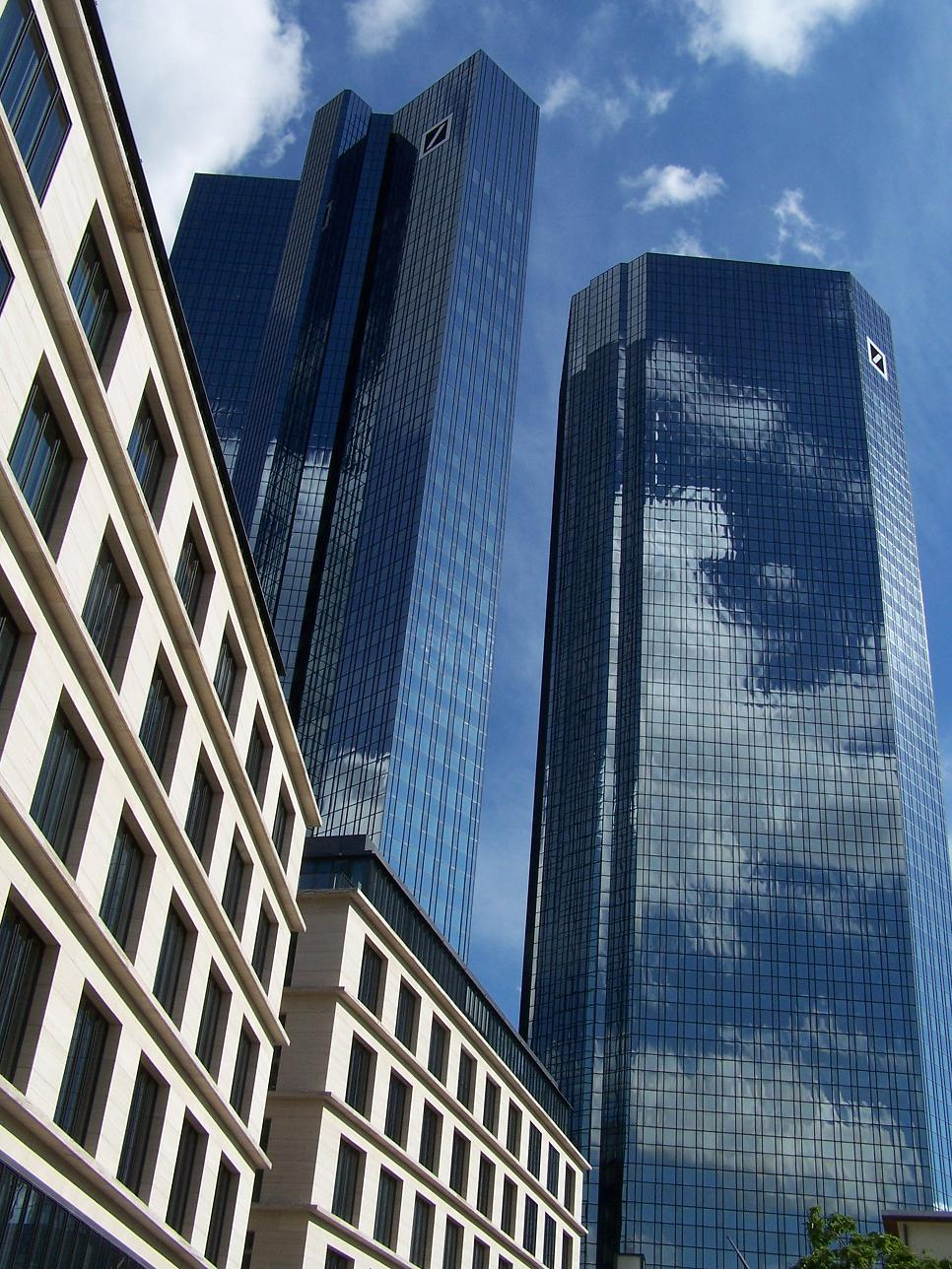 Deutsche Bank